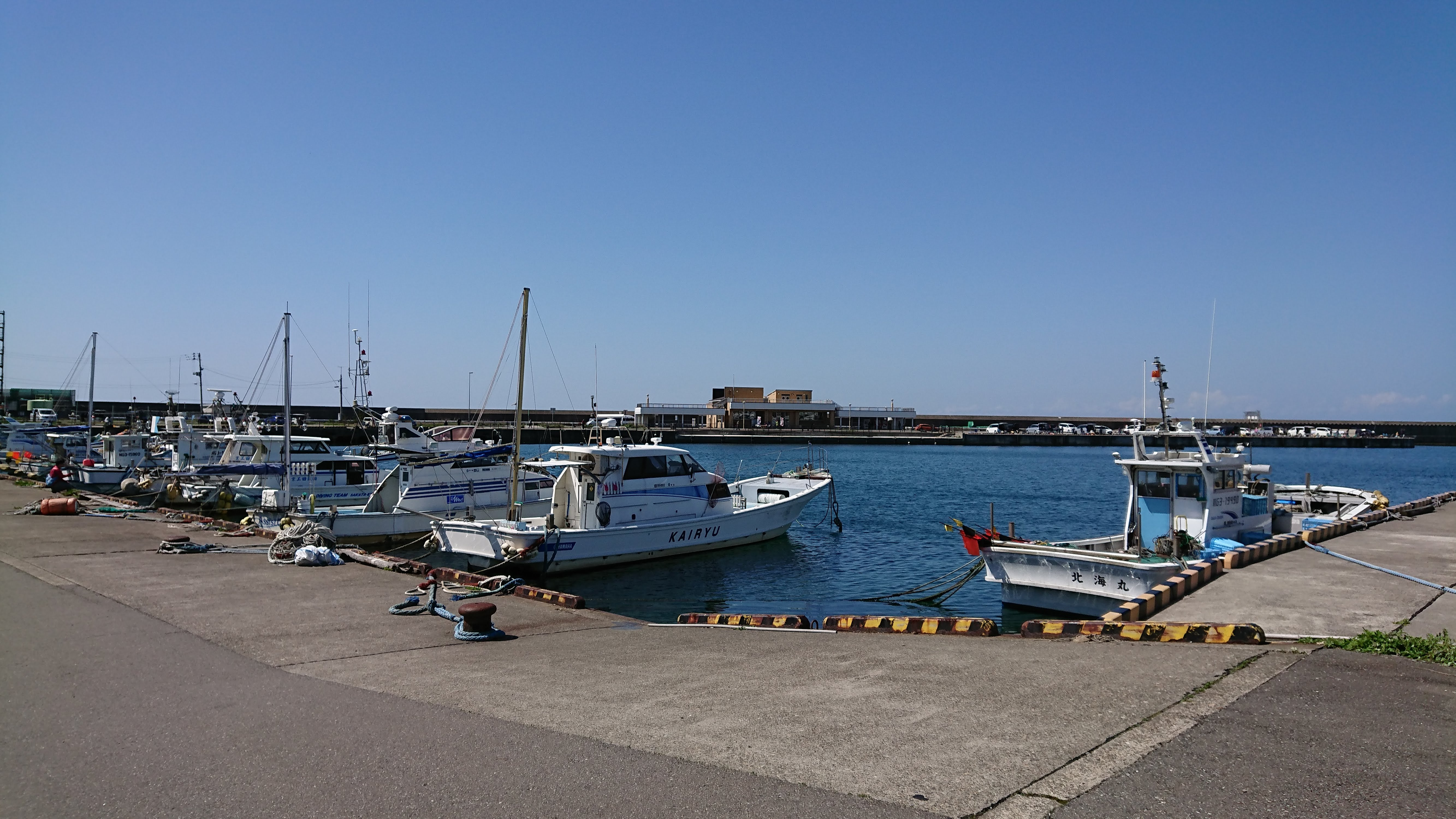 晴天時の柏崎港に停泊する船舶